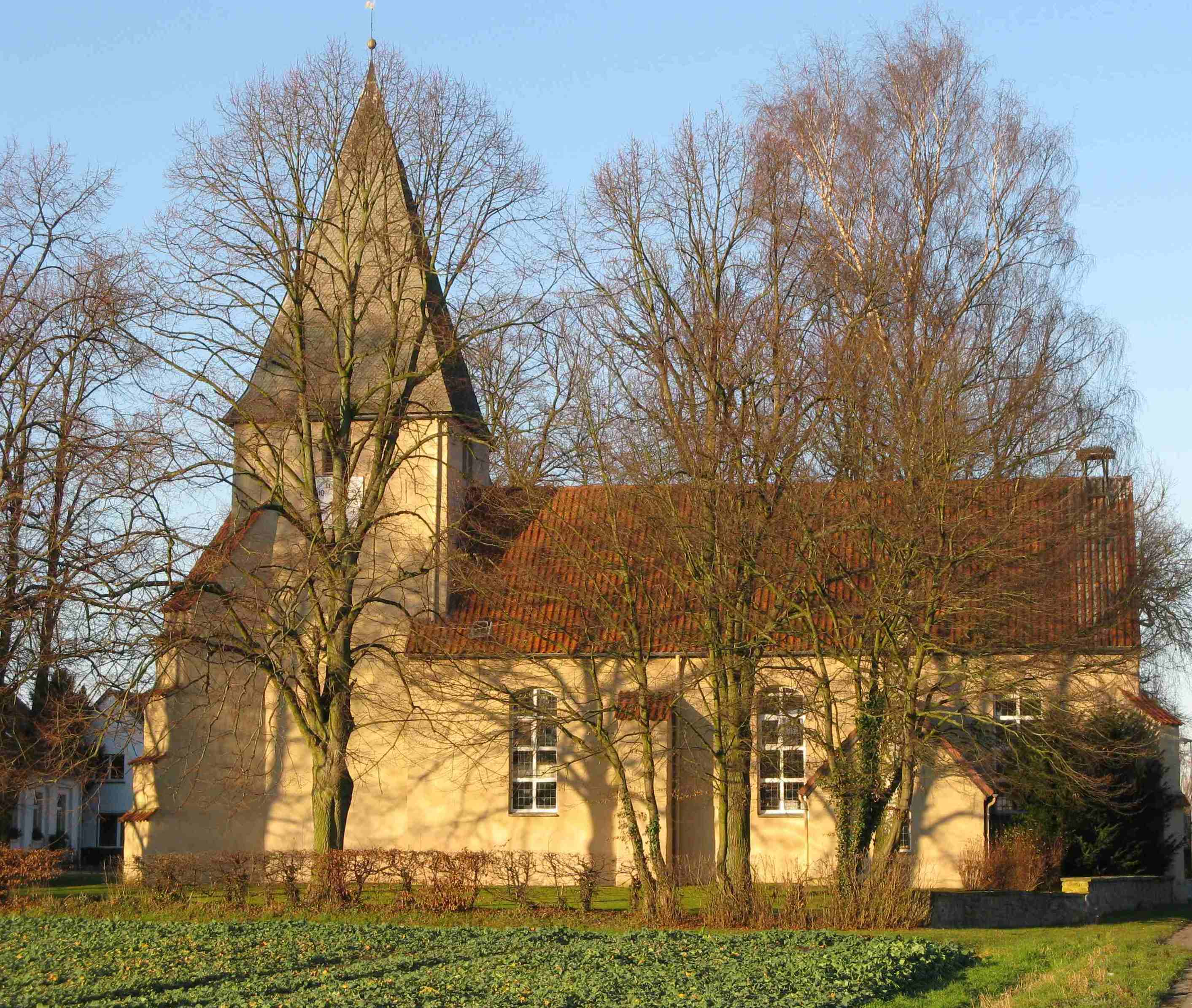 Kirche